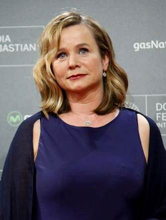 Emily Watson @ San Sebastian Festival 2016